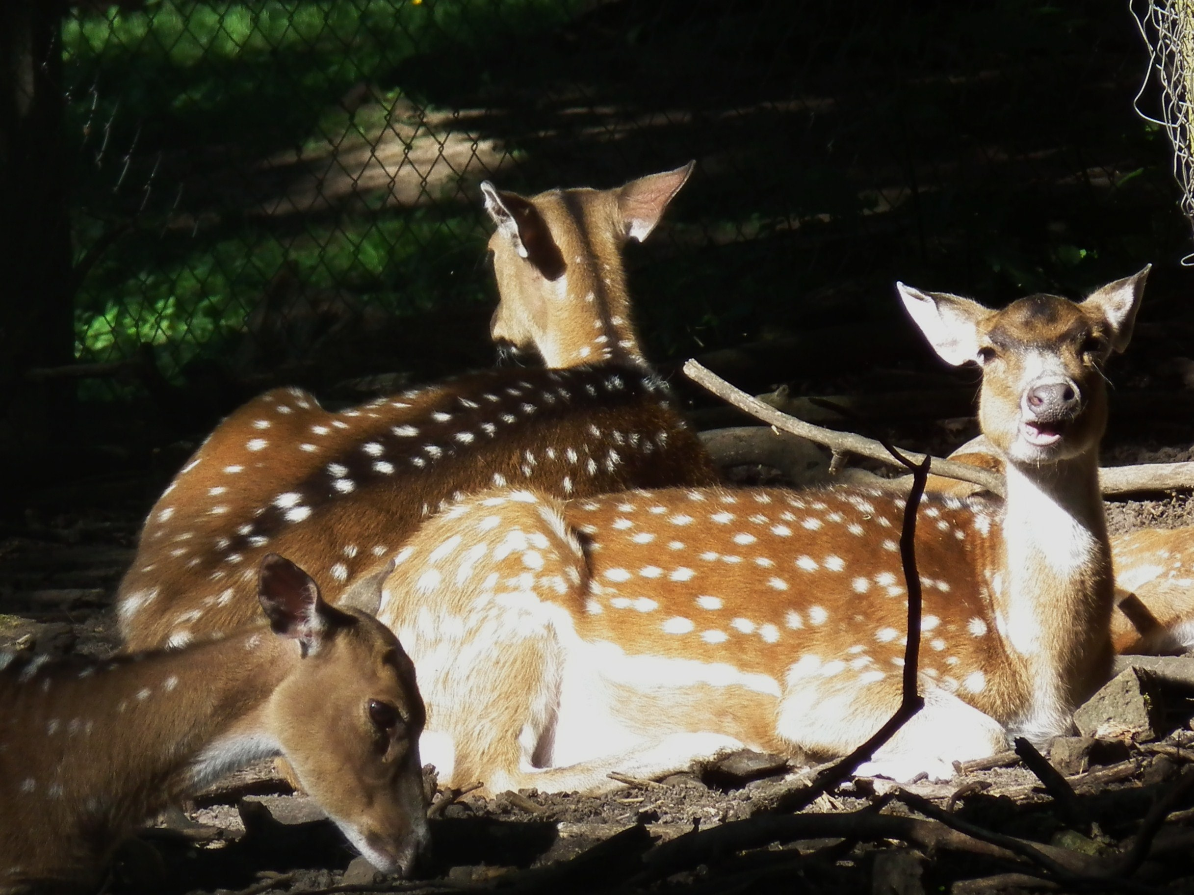 Axishirsch (Axis axis) im Wildpark Pforzheim (Baden-Württemberg, Deutschland)